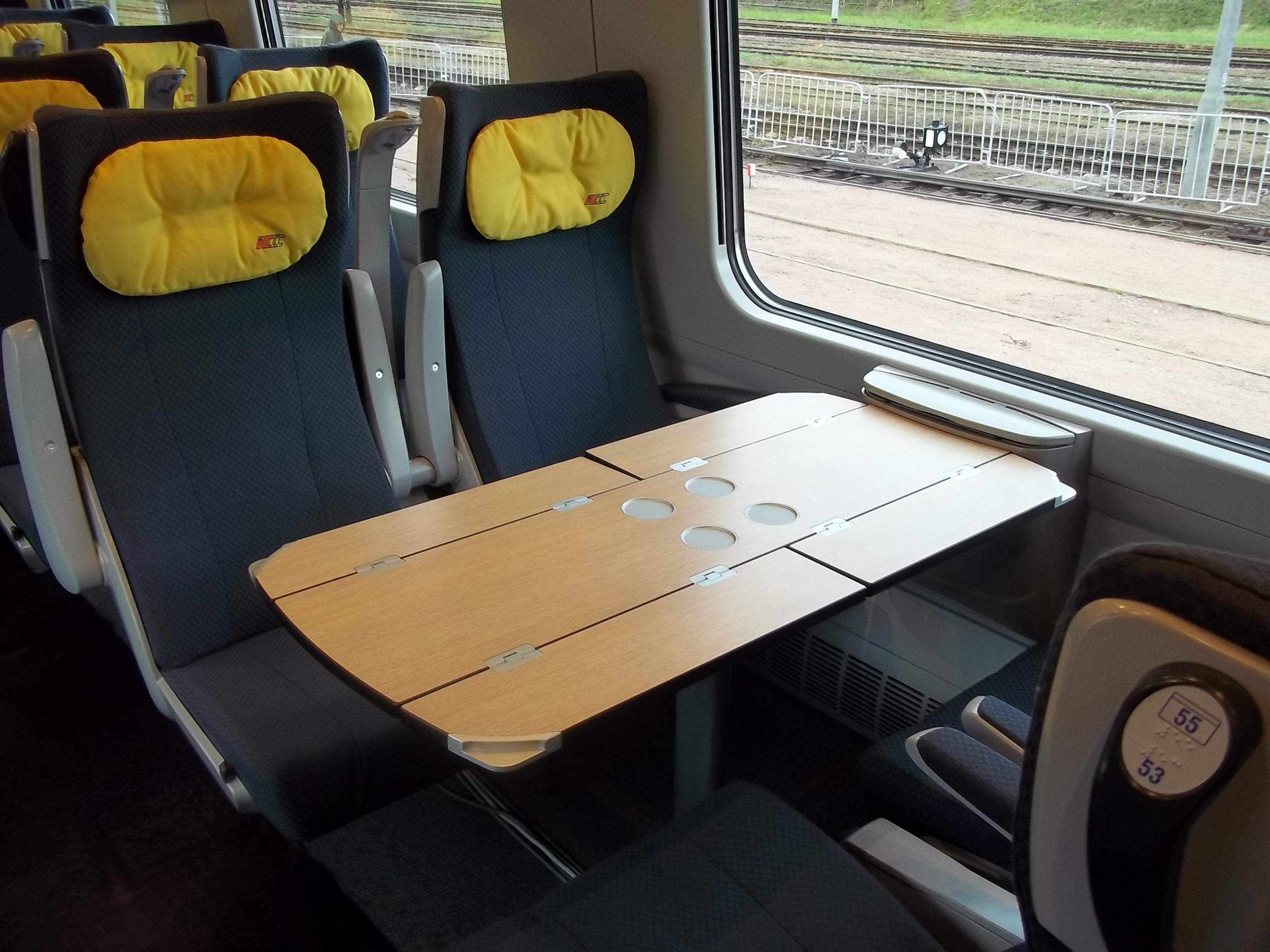 ED250-001 "Pendolino" - wnętrze wagonu 1. klasy.